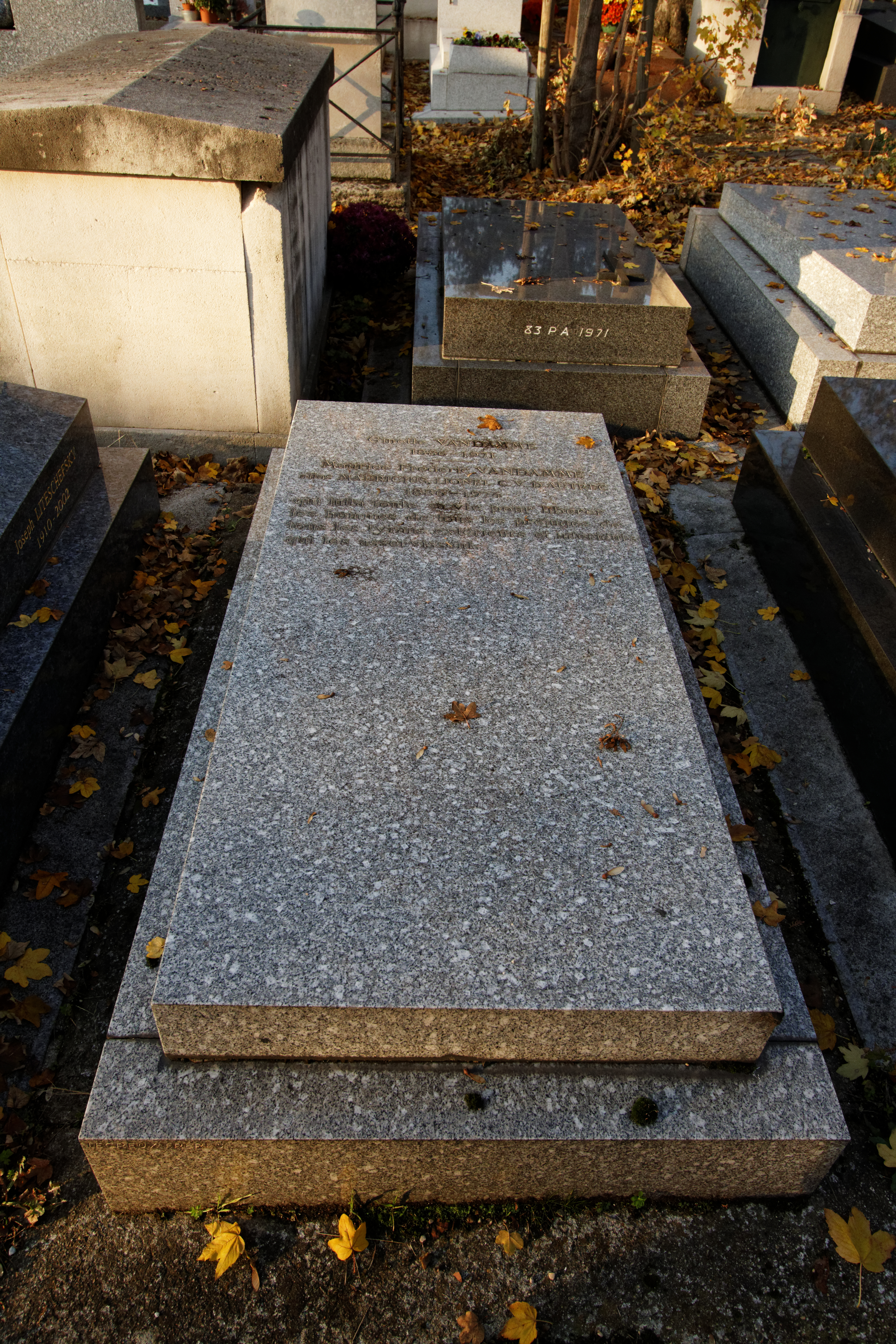 Sépulture de Maurice-Frédéric Vandamme dit Mauricius (1886-1974), anarchiste individualiste, antimilitariste et néomalthusien.